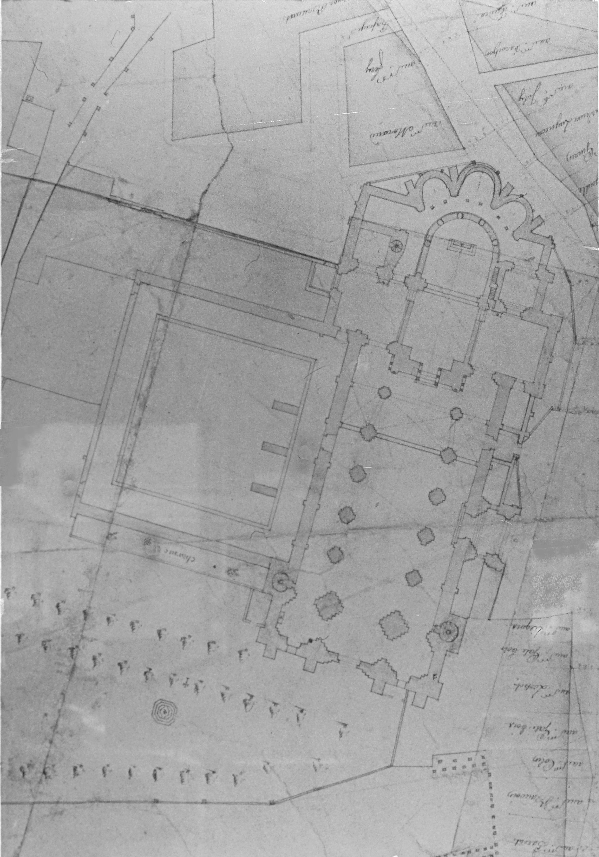 état des morceaux du cloître après les fouilles de réhabilitation.